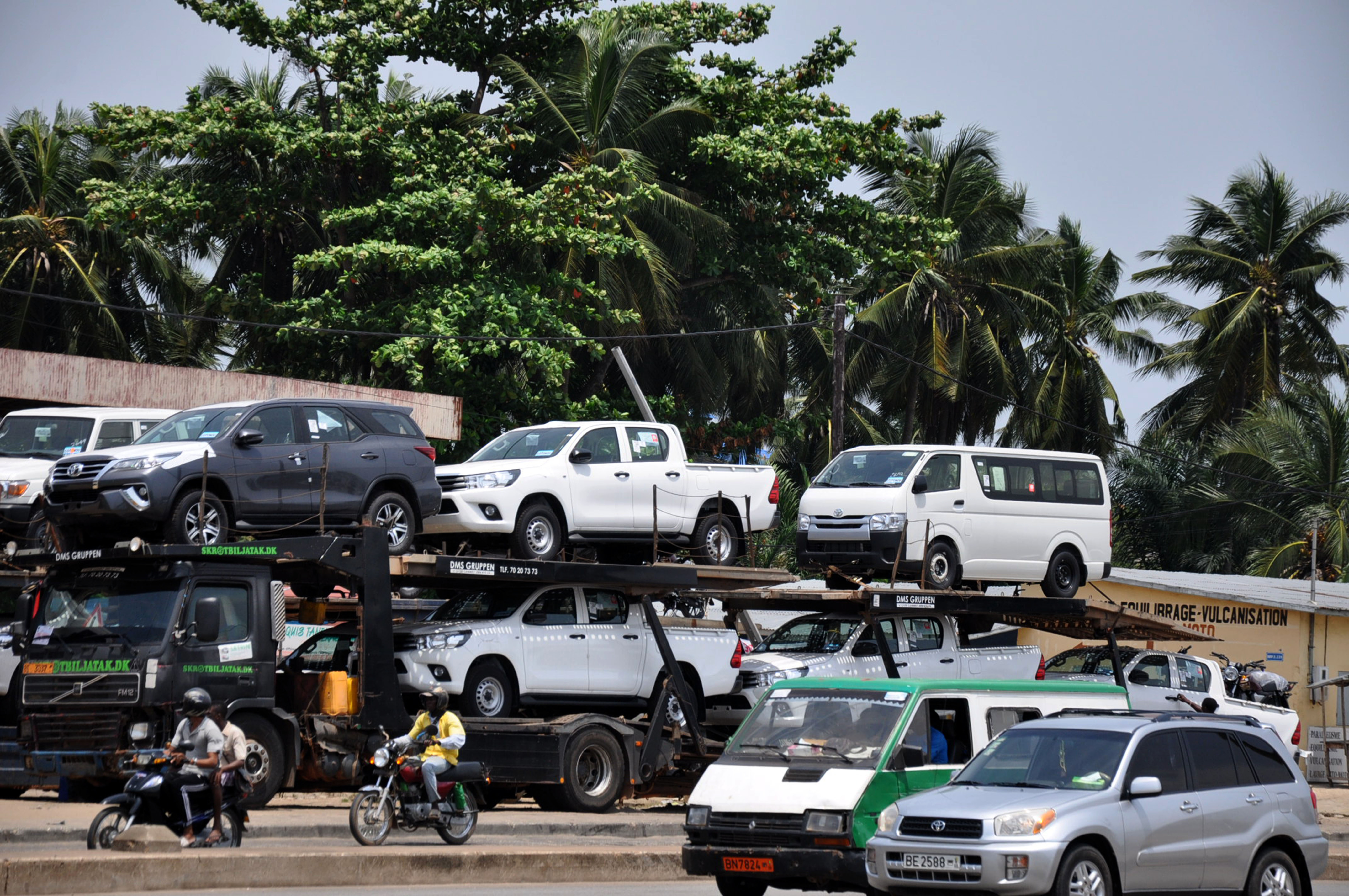 conveying a bit risky for road users in the event of a cable break This is an image with the theme "Africa on the Move or Transport" from: Benin